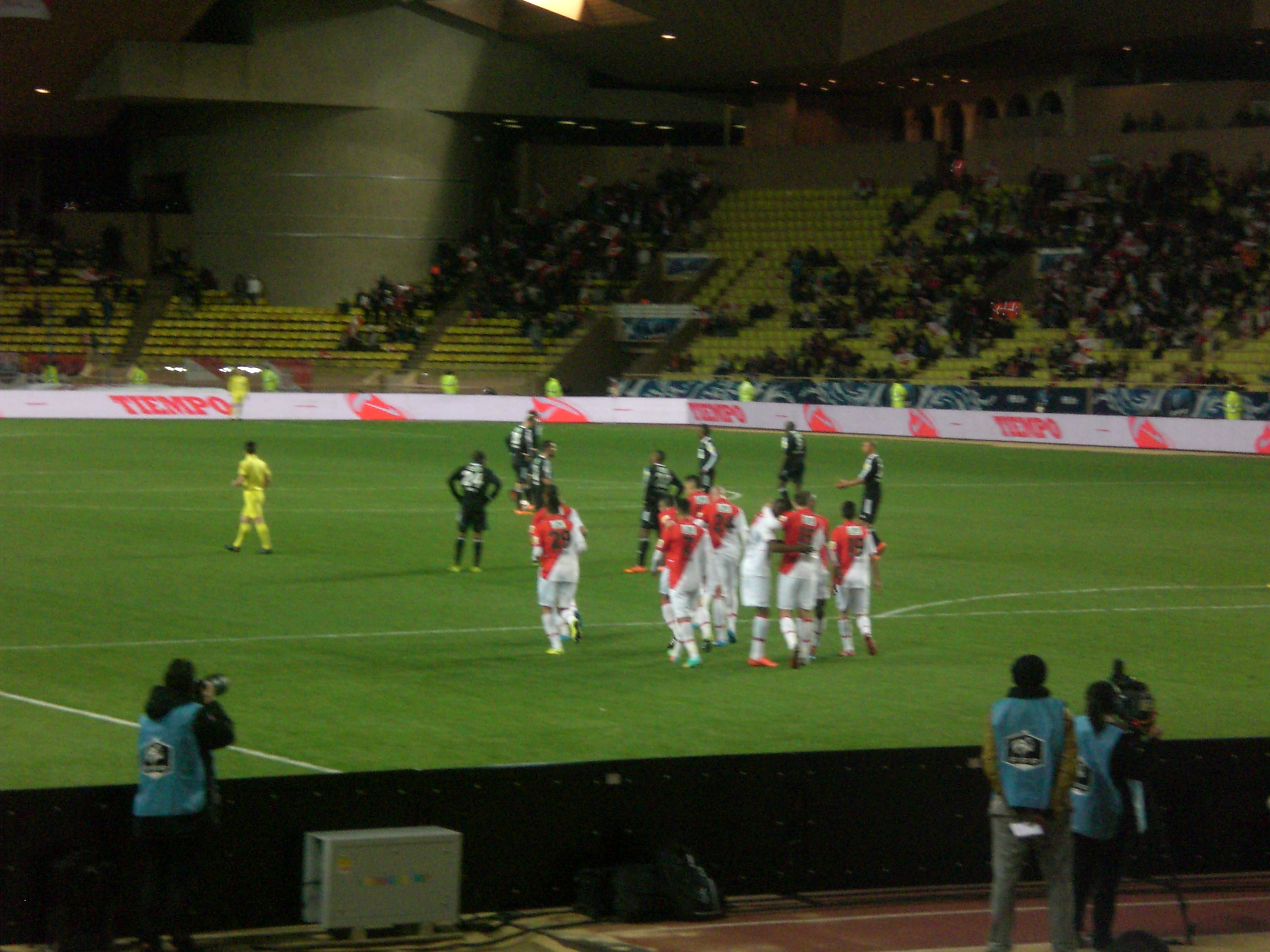 Célébration des monégasques après le deuxième but du match, marqué par Dimitar Berbatov, lors de la rencontre Monaco - Lens, quart de finale de la Coupe de France de football.